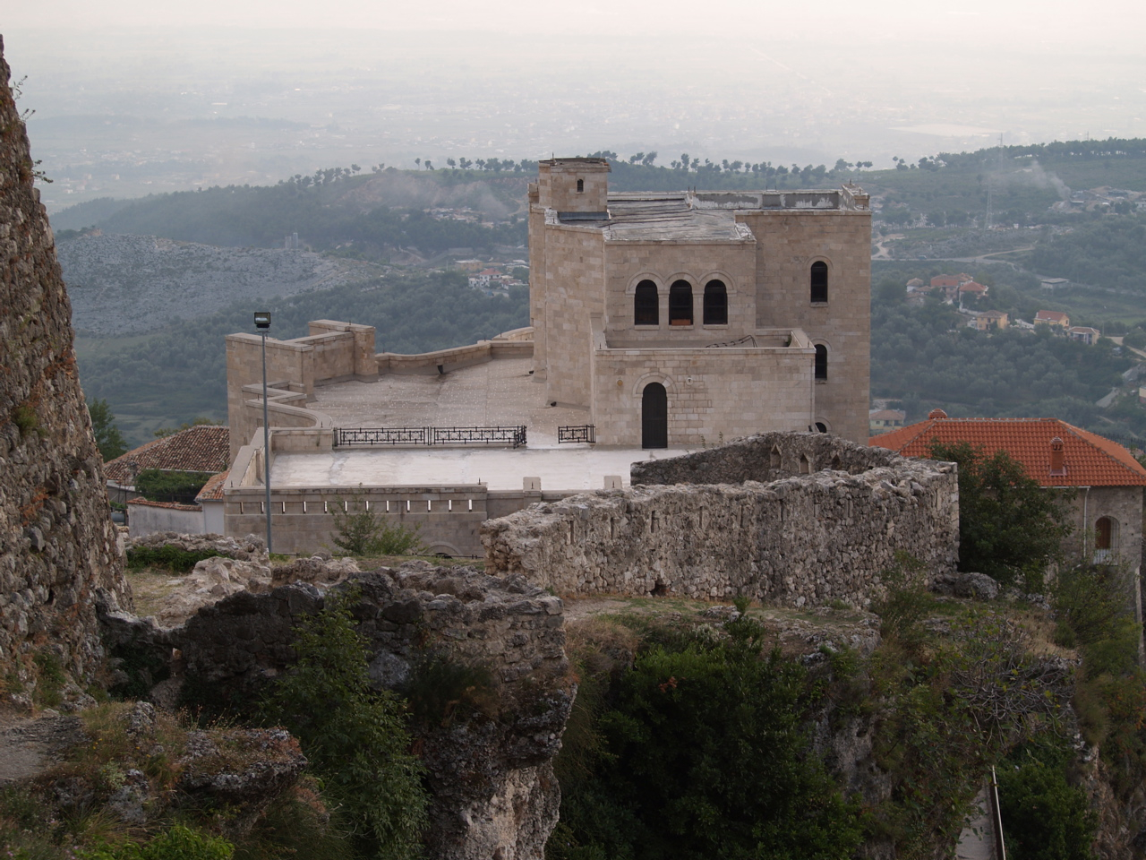 Kruje Albania